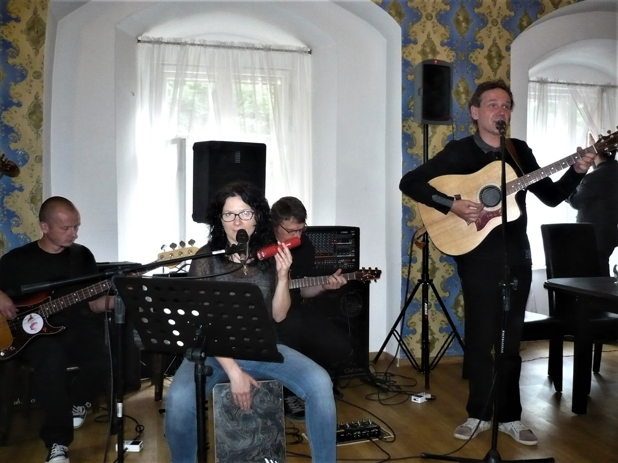 XXV Noworudzkie Spotkania z Poezją